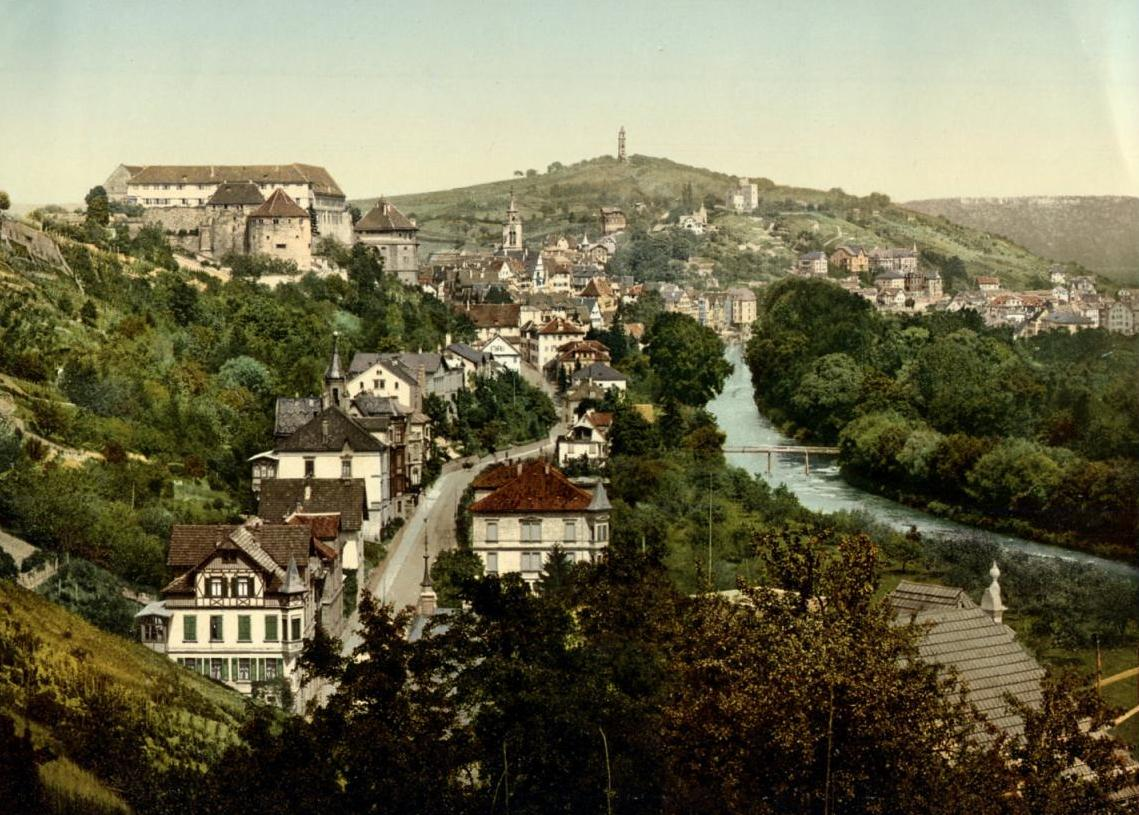 Tübingen mit Österberg und Neckarhalde vom Schlossberg, kolorierte Fotografie 17 x 22 cm.